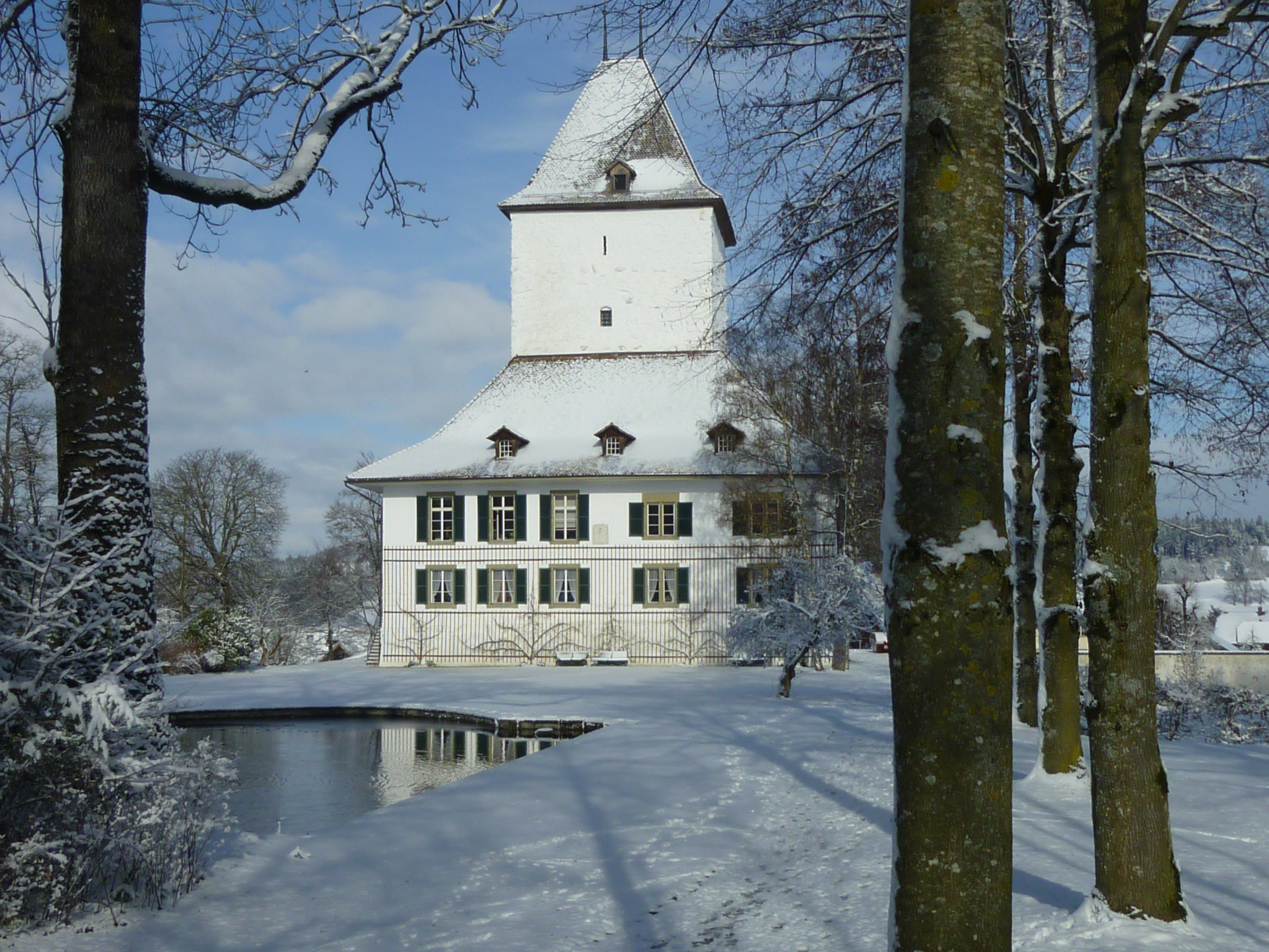 Schloss Wyl ehemaliger Sitz der Kantonsverwaltung